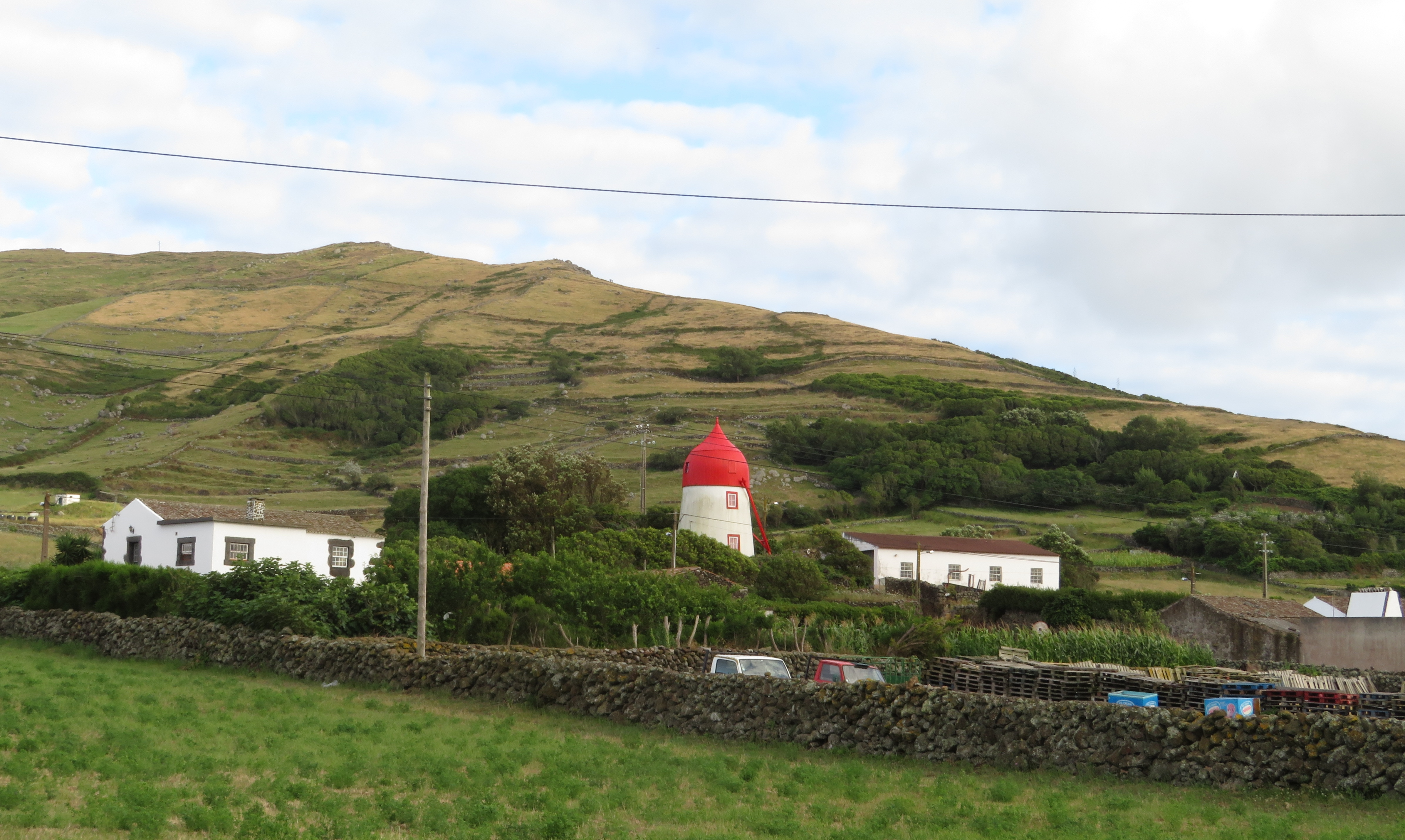 Windmühle in Guadalupe, Insel Graciosa, Azoren, Portugal